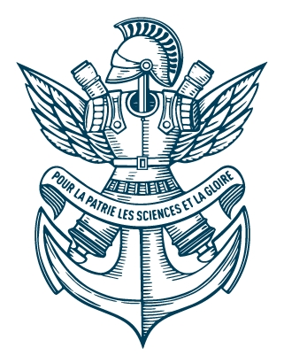 Les armes de l'École polytechnique, blason historique où figure la devise de Napoléon "Pour la Patrie, les Sciences et la Gloire", sont le symbole qui porte les valeurs de l'École et de sa dimension militaire.